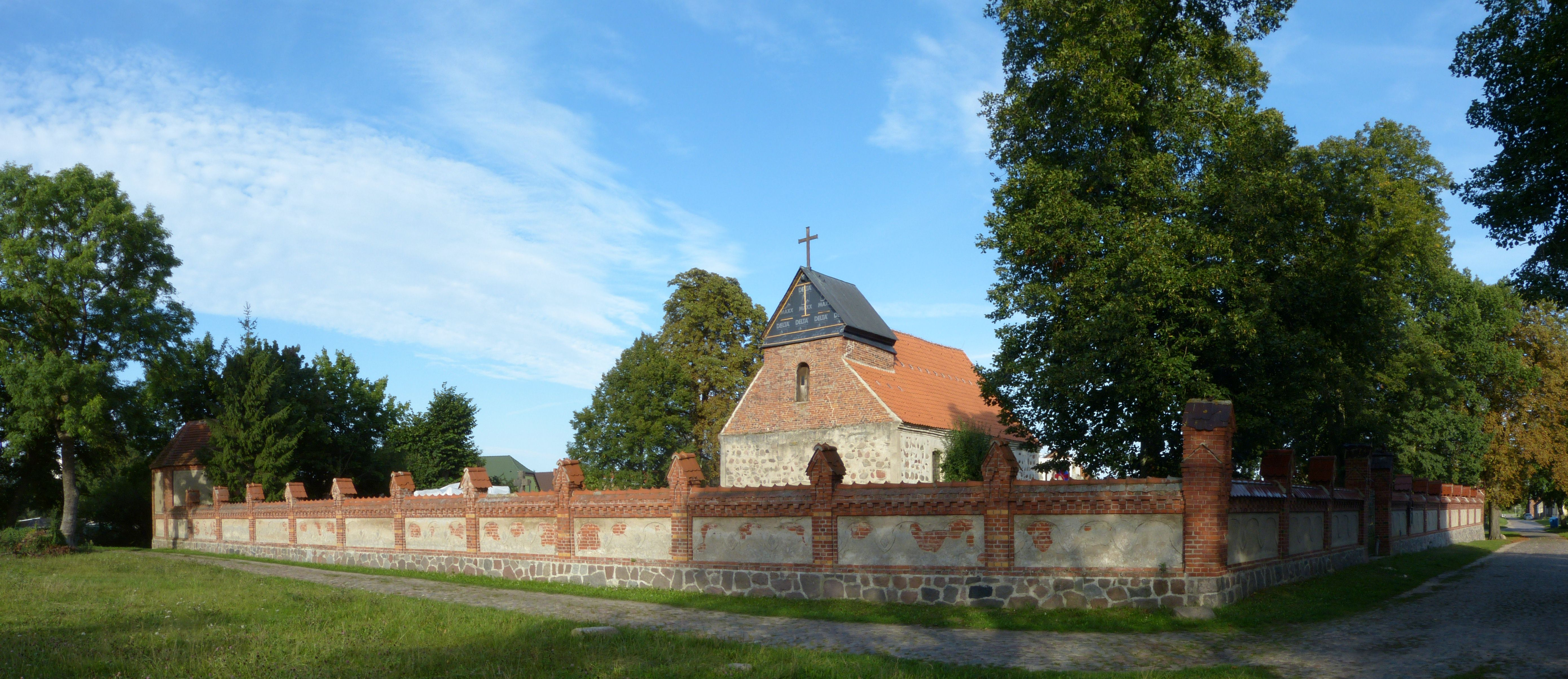 Kirchhof Löwitz, Westseite und Blick zur Südseite